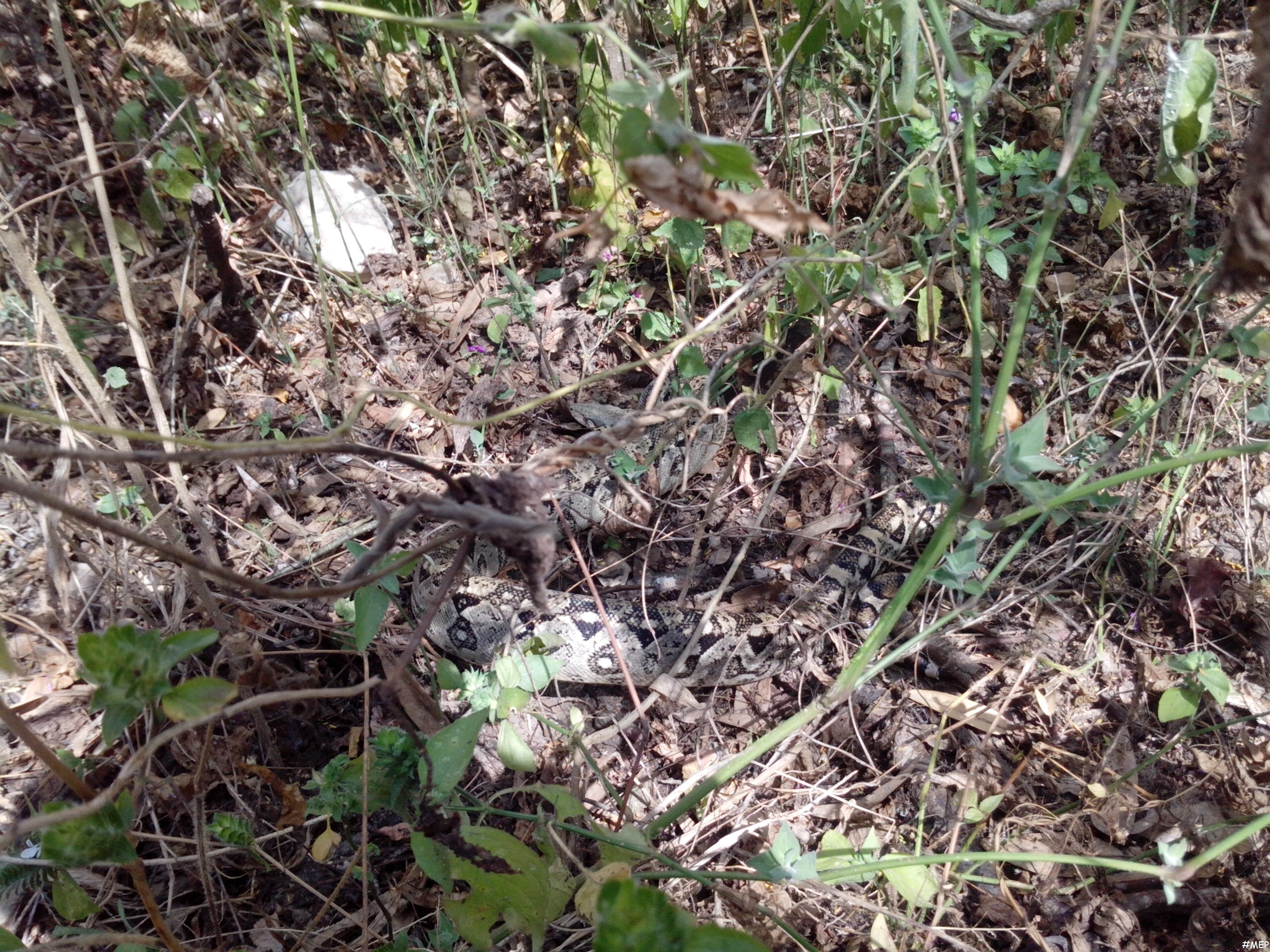 Espécimen hembra de 2 metros.